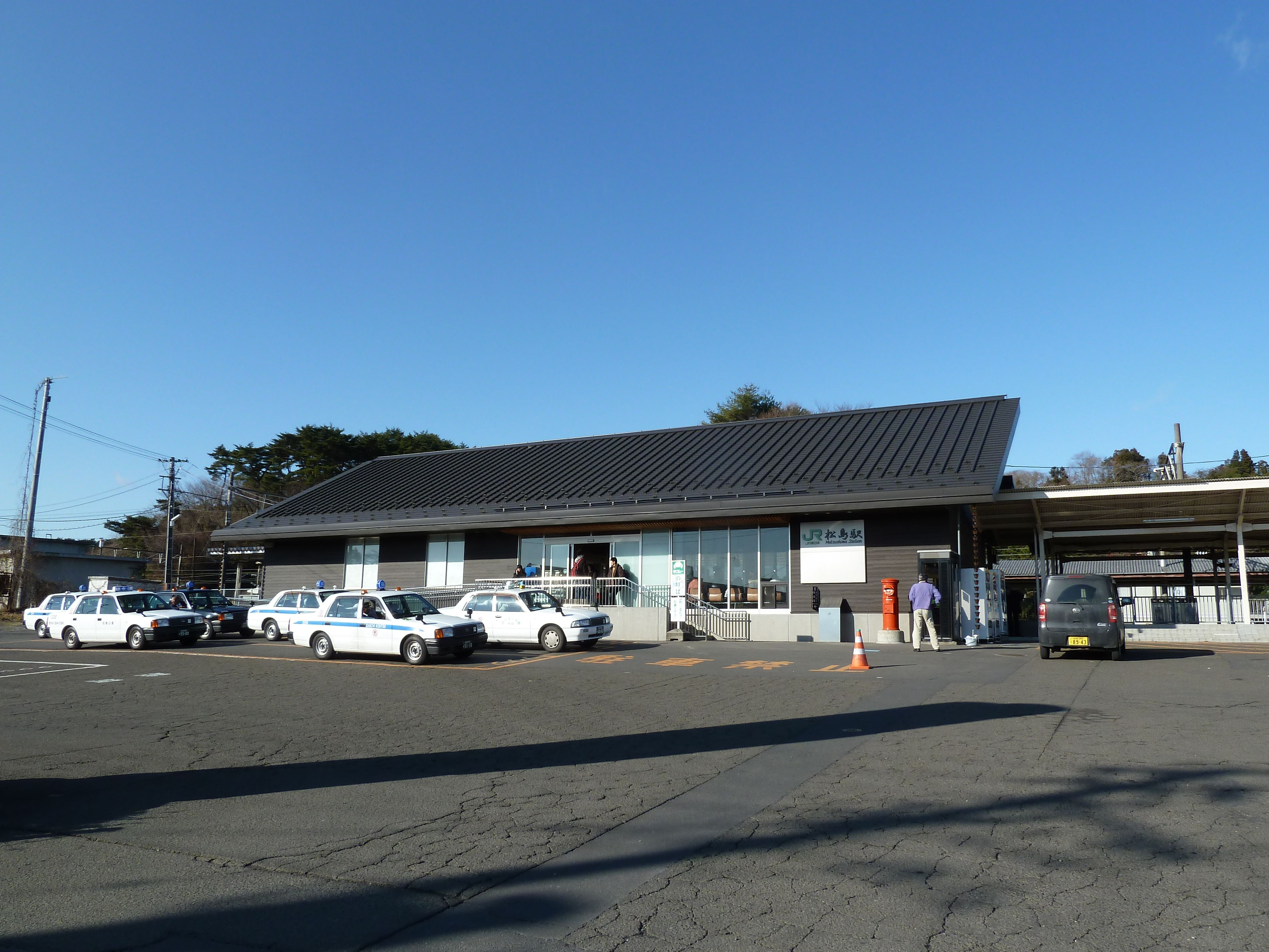 松島駅の駅舎